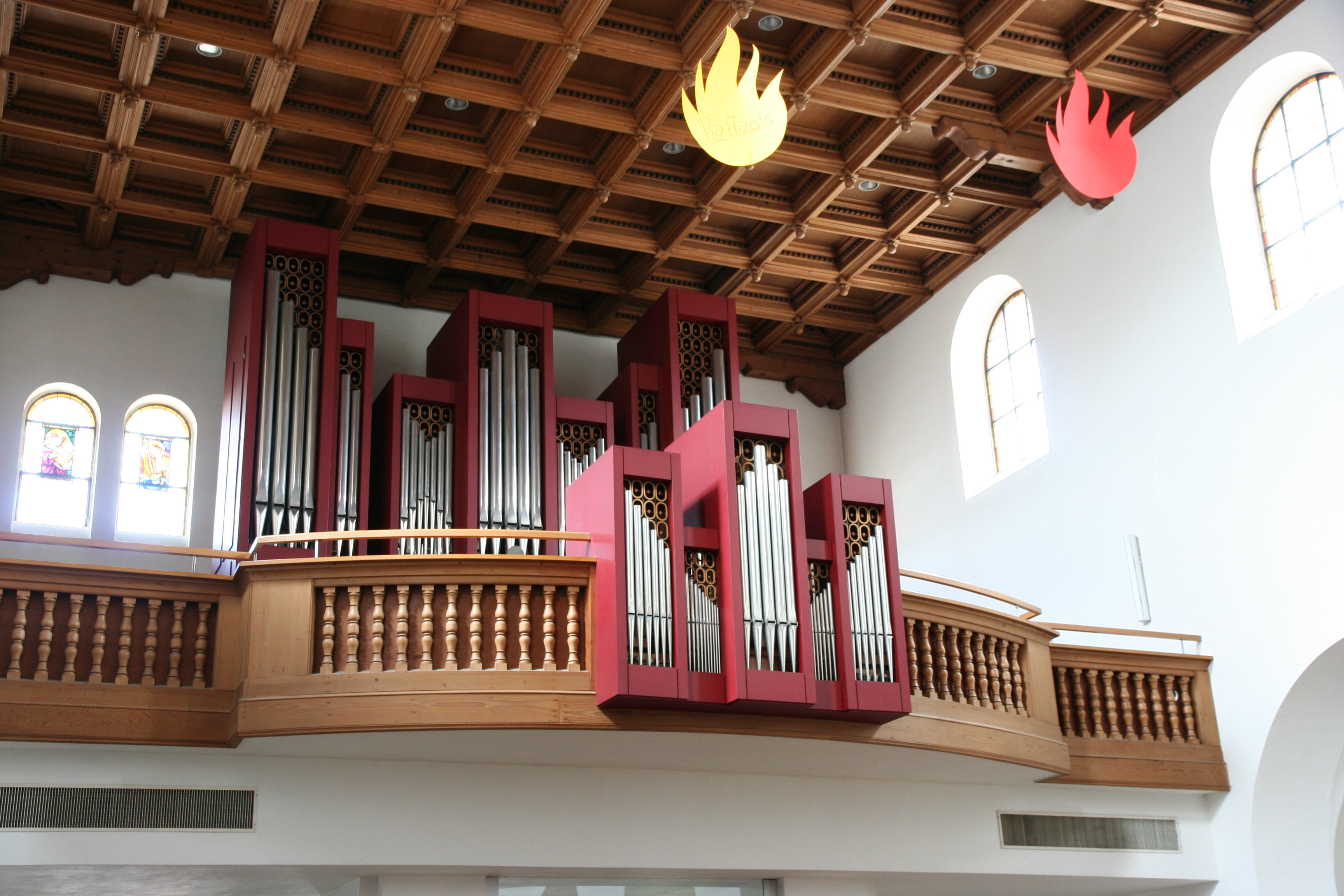 Römisch-katholische Pfarrkirche St. Margareten Wald ZH, Orgel